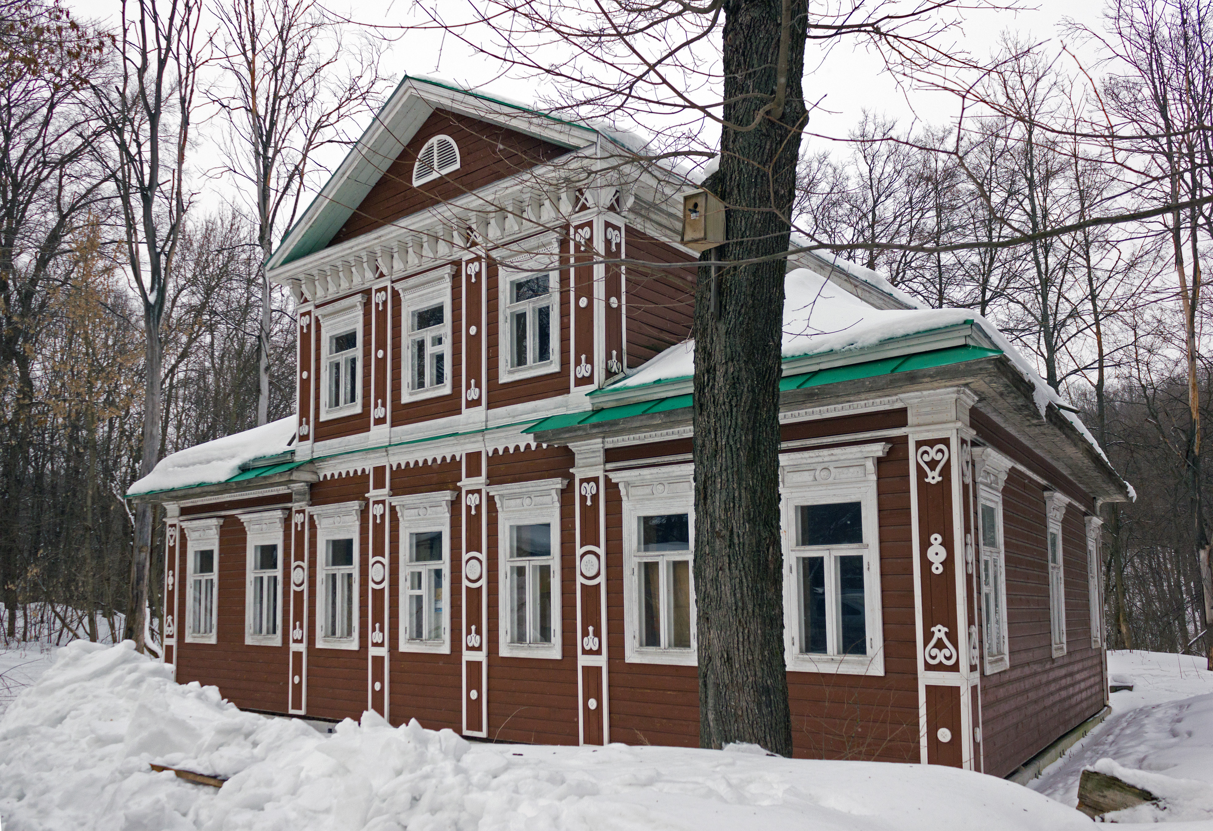 Музей культуры и быта народов Нижегородского Поволжья «Щёлковской хутор»: улица Горбатовская, 41, Нижний Новгород, Нижегородская область Дом титулярной советницы А. А. Клочковой, построен в 1837–1838 гг. по проекту первого нижегородского городового архитектора Георга Кизеветтера. Находился в центре города, на улице Варварской (дом № 27). В 2007 году был разобран и перенесён в музей, а на его месте было построено новое здание.